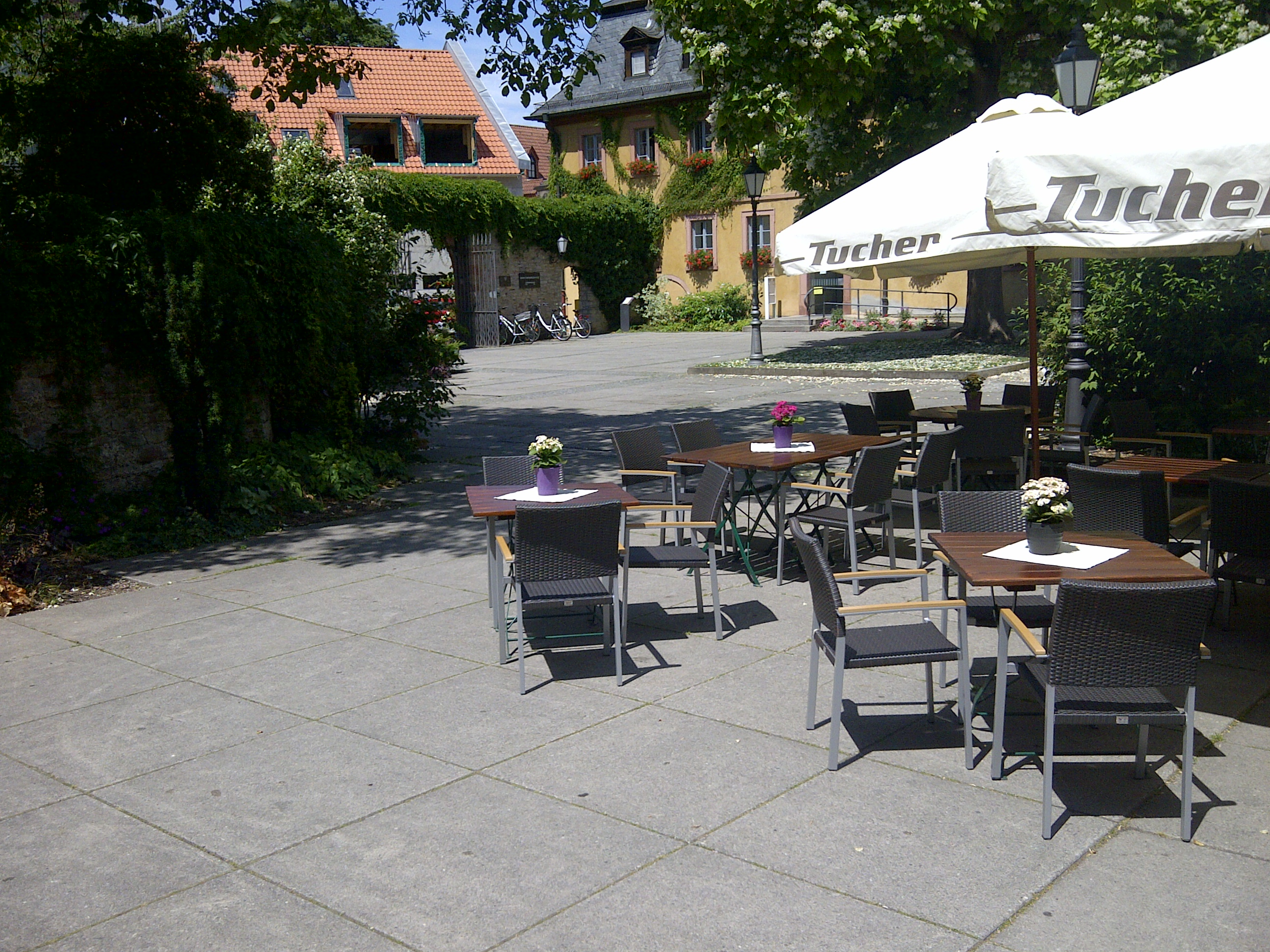 Großformatplatten 100x100x70 gebaut 1972